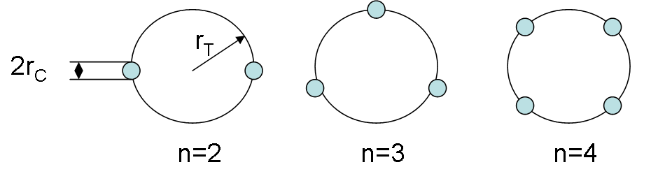 Représentation de faisceaux de 2 jusqu'à 4 conducteurs